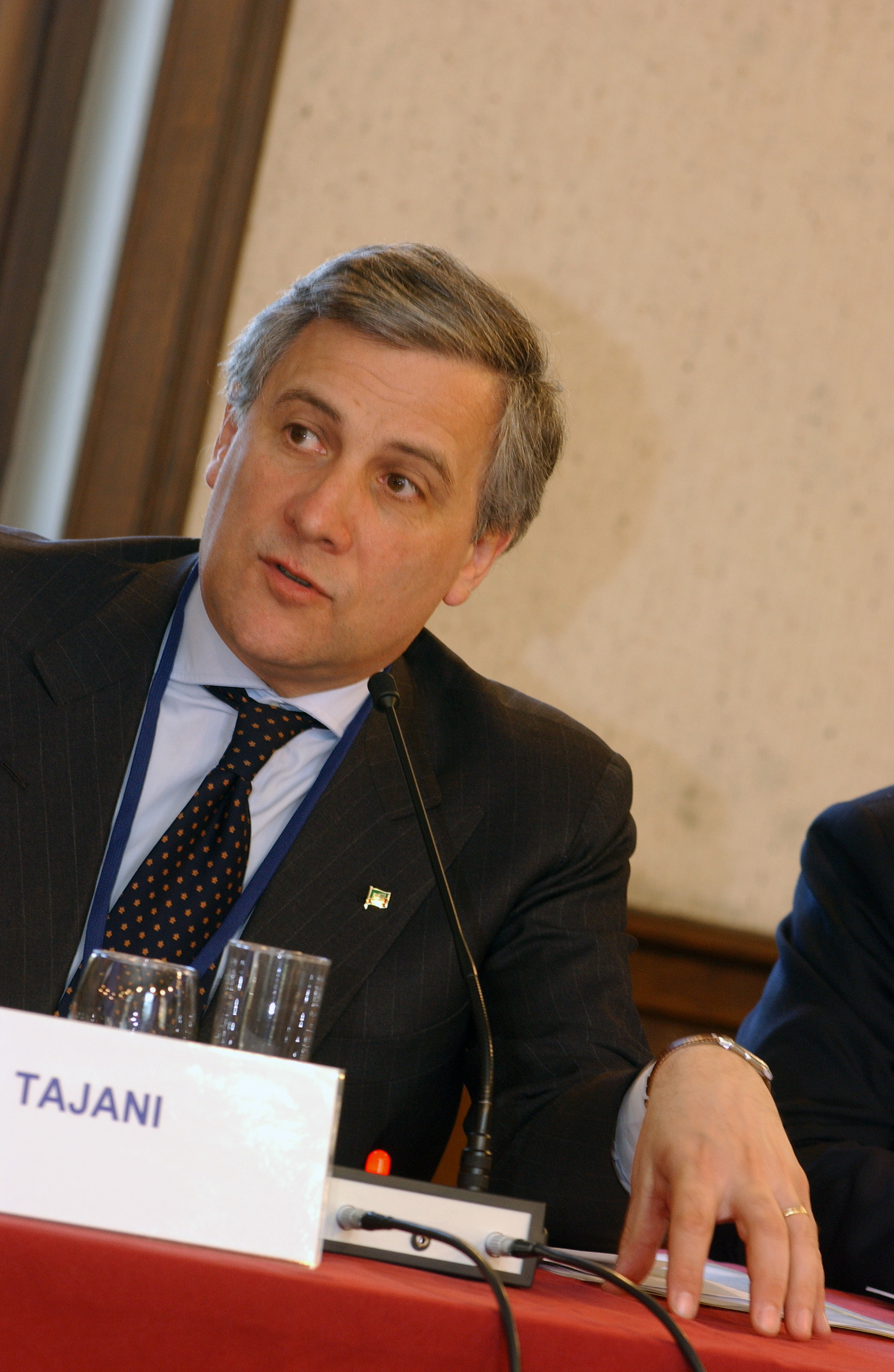 EPP Summit 23 March 2006